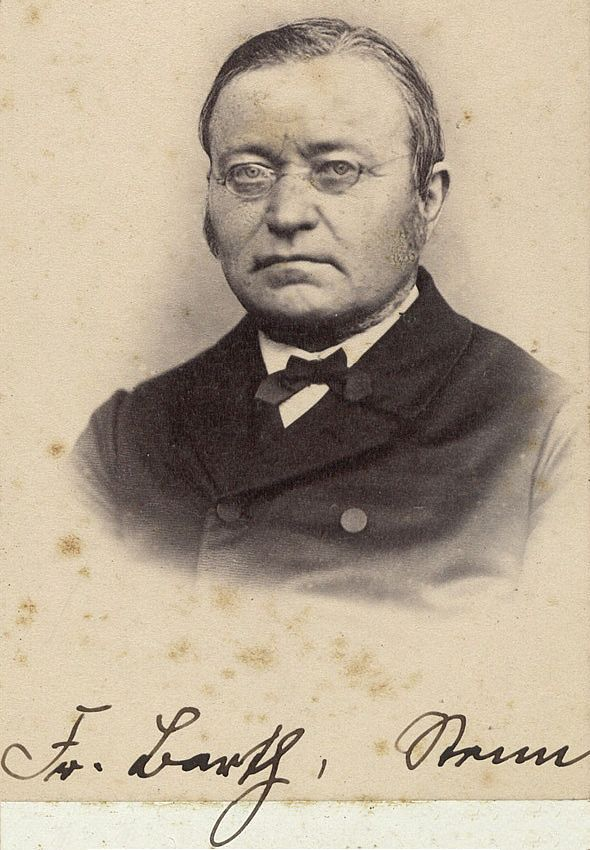 Friedrich August Barth (1816–1879), sächsischer Landtagsabgeordneter